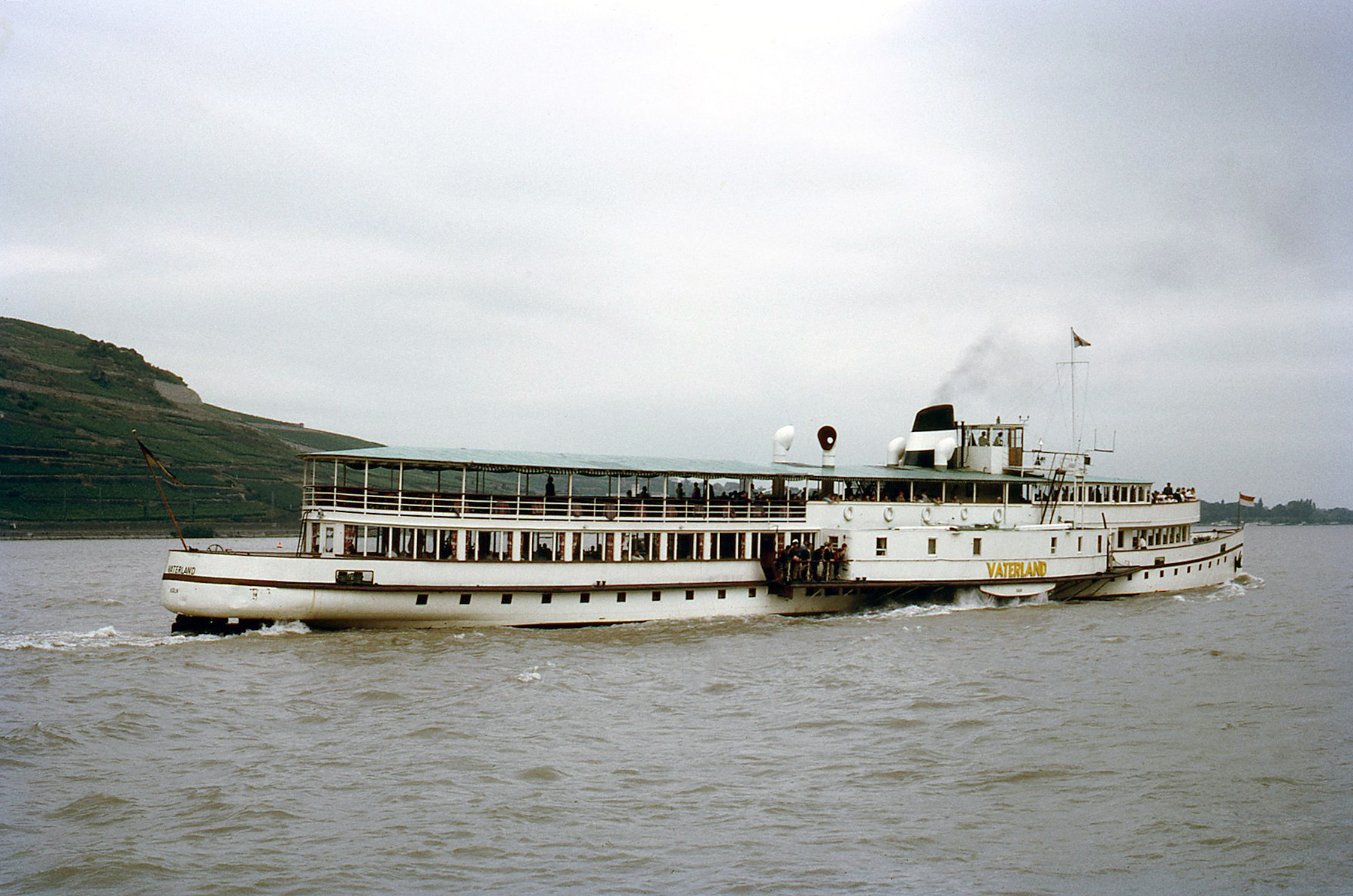 Schaufelraddampfer Vaterland der Köln-Düsseldorfer im Jahre 1973 auf dem Rhein Paddle Wheel Steamer "Vaterland" on Rhine River Cruise, Germany. Taken on Kodachrome on 14 Aug 1970.